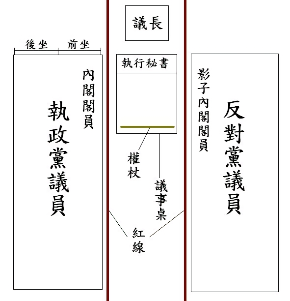 下议院议事平面图. 下議院議事廳平面圖。. The Floor Plan of House of Commons Chamber.